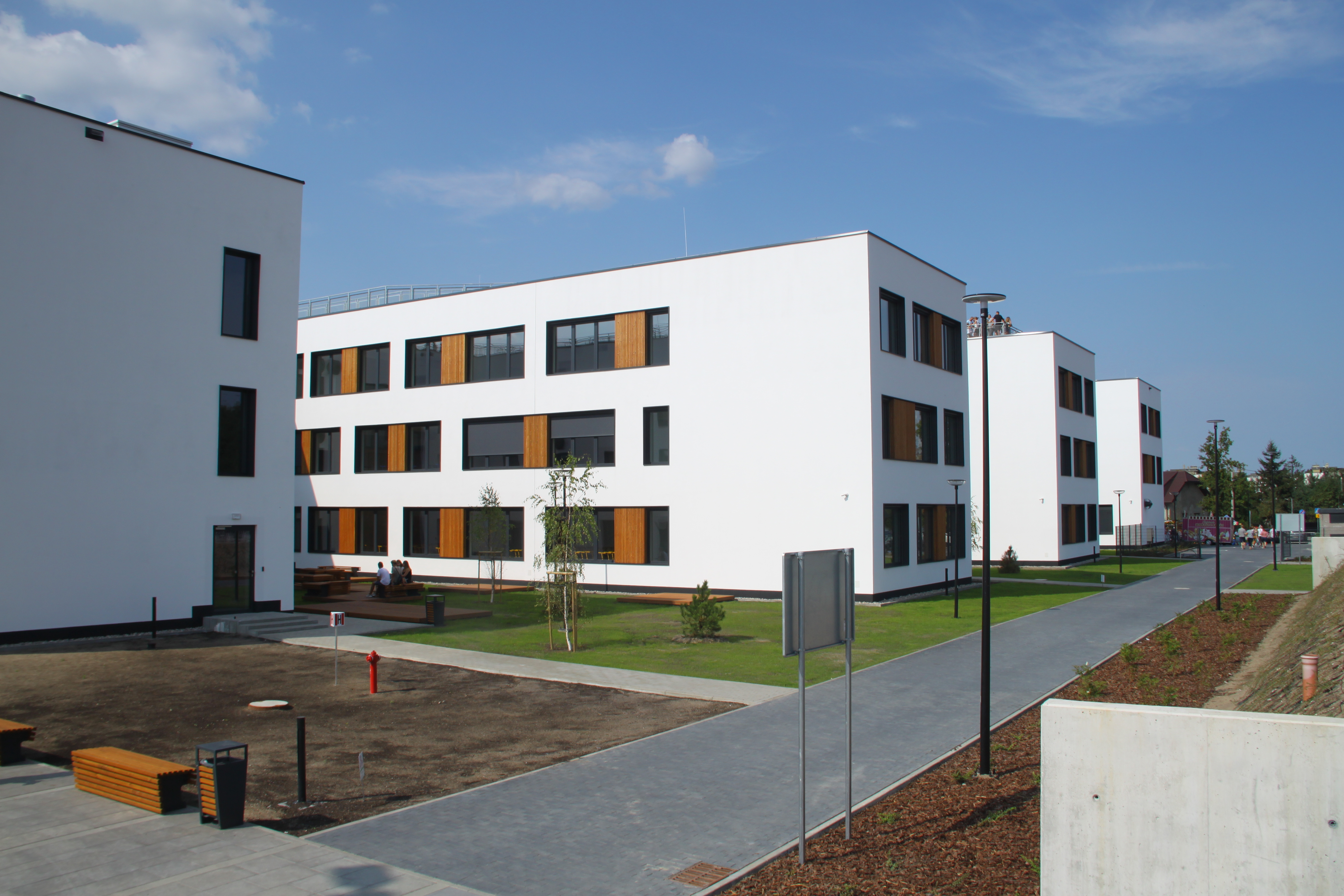 Budynek szkoły podstawowej na terenie Mareckiego Centrum Edukacyjno-Rekreacyjnego przy ul. Wspólnej w Markach